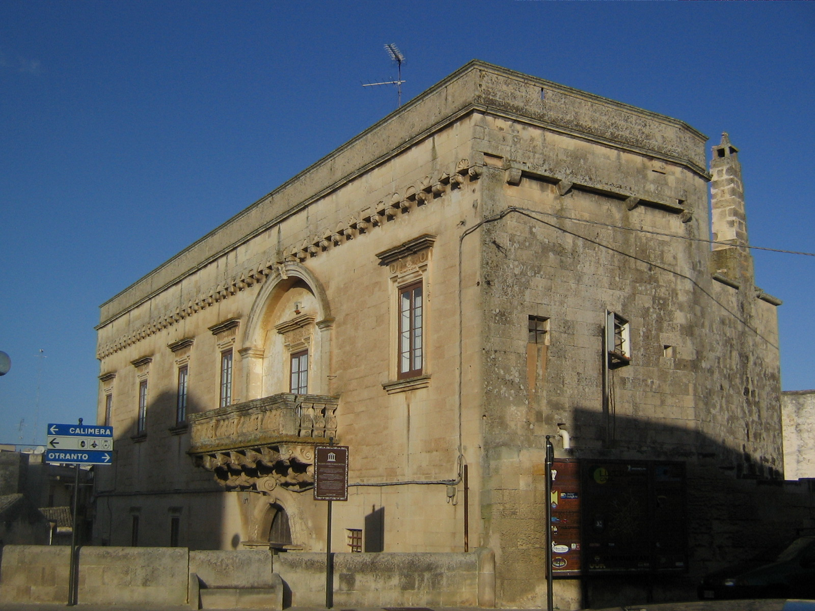 Martano Palazzo Andrichi-Moschettini